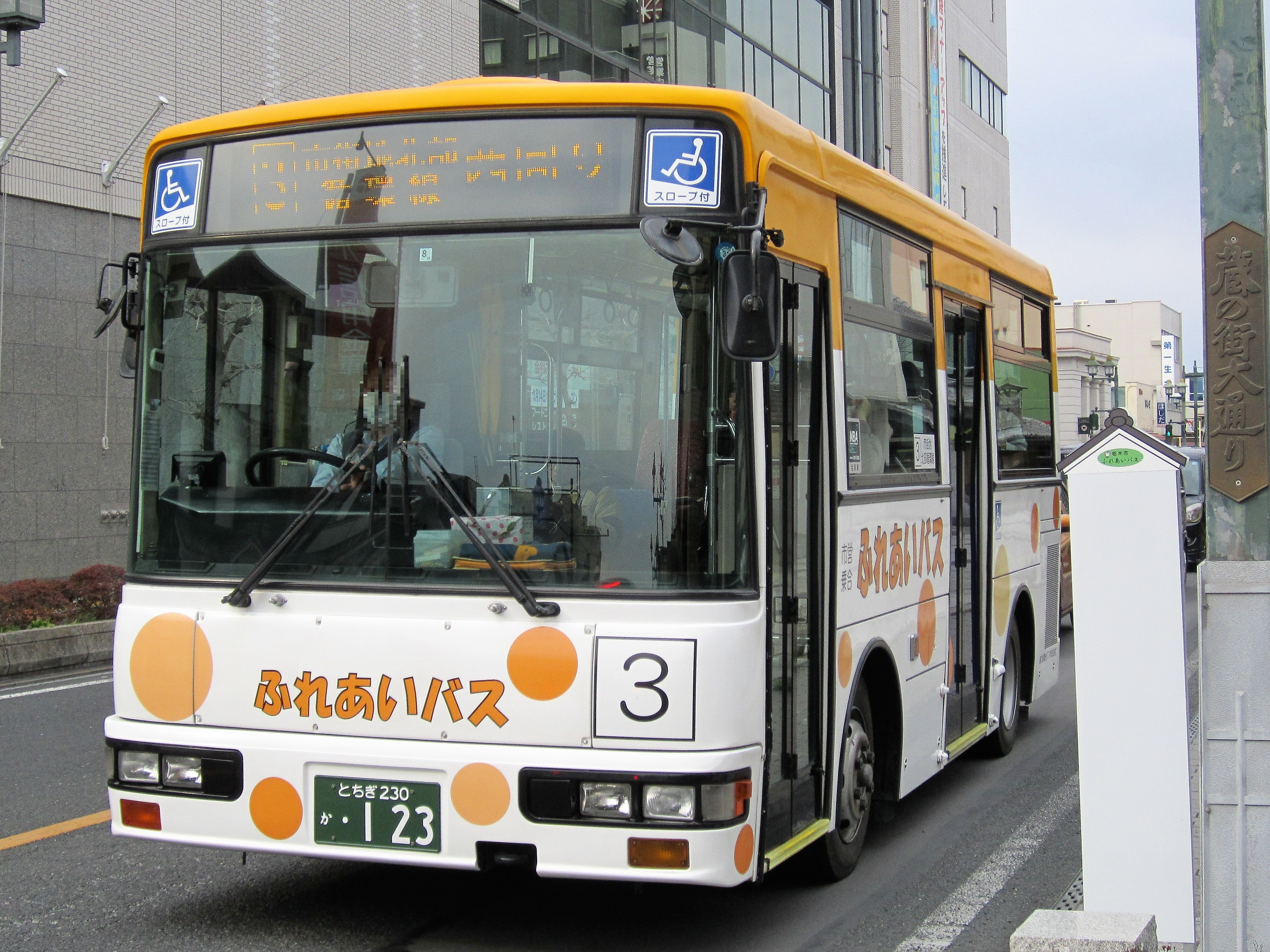 栃木市営バス（ふれあいバス）市街地北部循環線 Canon PowerShot A2200